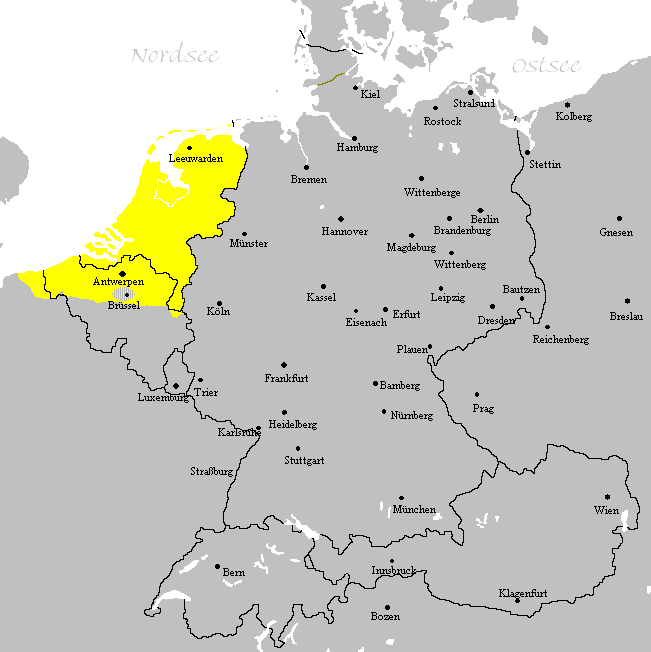 Darstellungskarte mit dem Verbreitungsgebiet der niederländischen Standardsprache inklusive des flämisch-niederländischen Sprachzipfels in Französisch-Flandern.